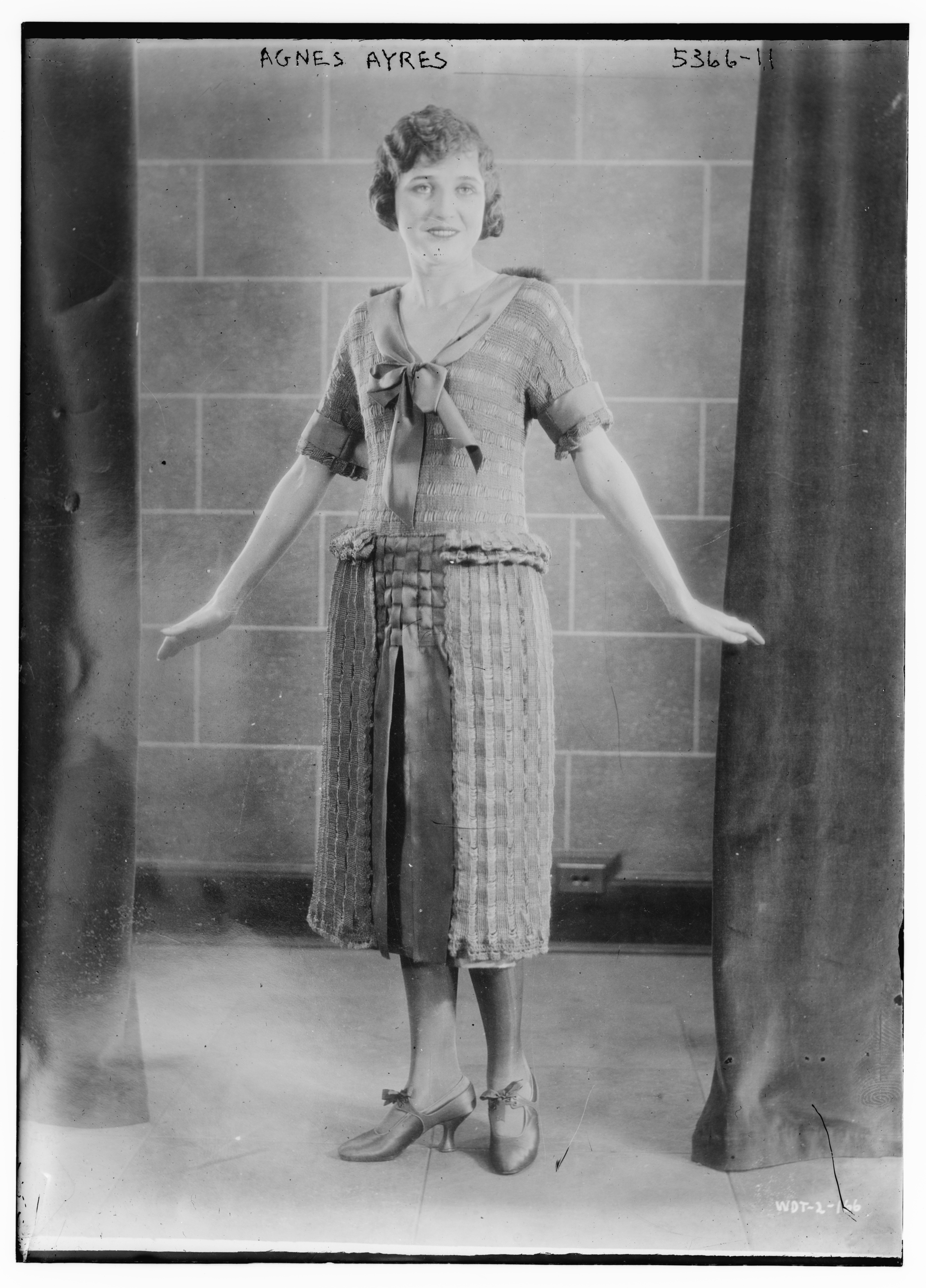 Agnes Ayres